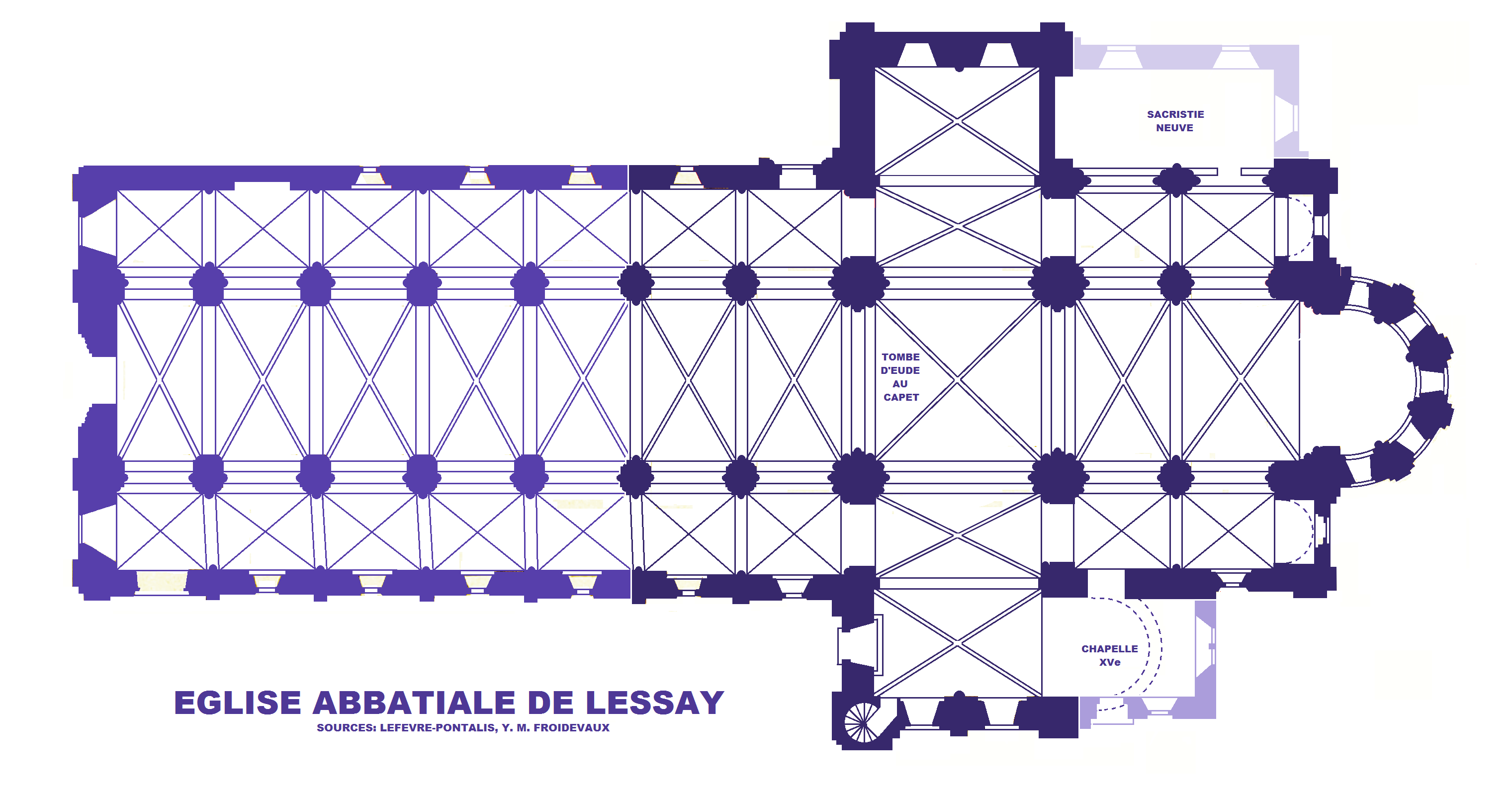 Abbatiale de Lessay, plan orienté Est